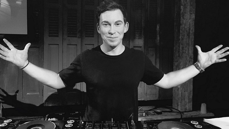 Hardwell en su Radioshow